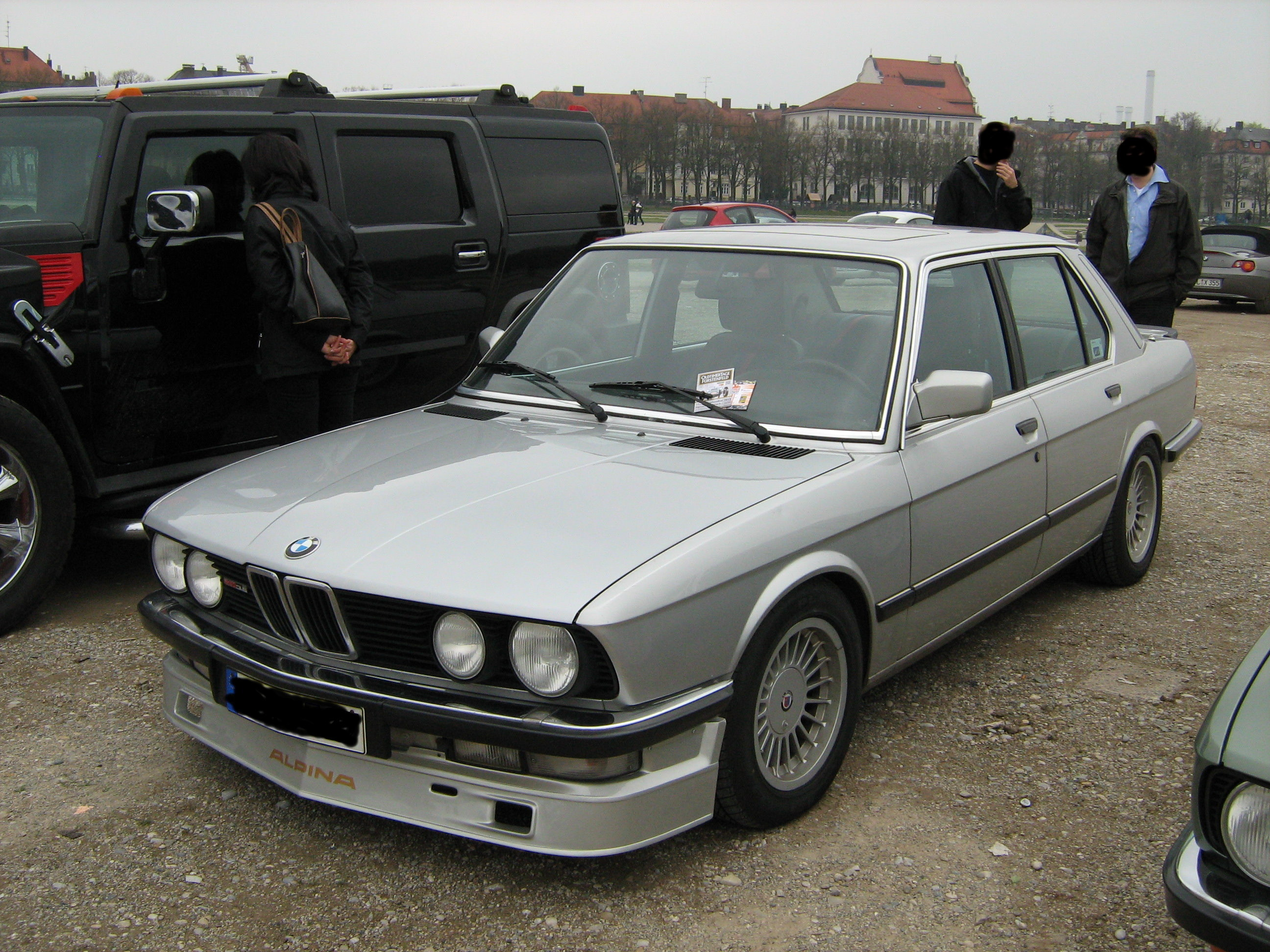 Alpina B10 3,5 (1985-87)